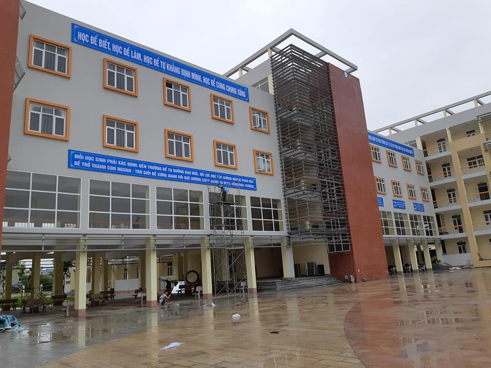 Một góc trường mới